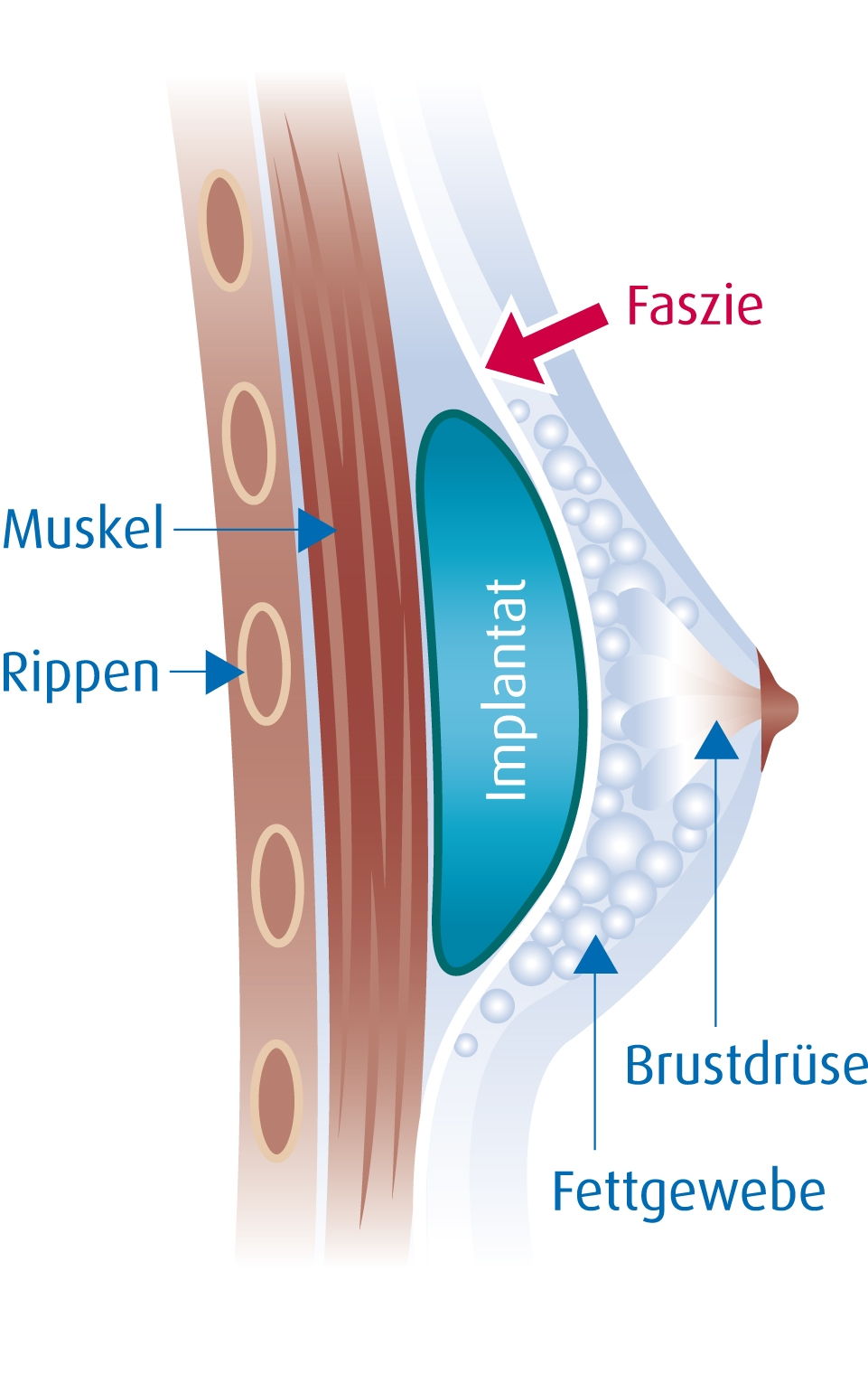 Dies ist ein Schaubild zur subfaszialen Methode der Brustvergrößerung. Das Implantat wird dabei direkt innerhalb des Muskelstrumpfs und unter die den Muskel bedeckende, sogenannte Faszien-Schicht einsetzen und somit in den Muskel gelegt. Die zeitaufwendigere und seltenere Operationsmethode verspricht ein verringertes Risiko der Kapselfibrose sowie in optisch und haptisch natürlicheres Ergebnis als bei der Lagerung vor oder hinter dem Muskel.